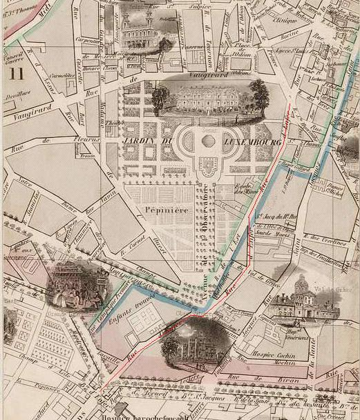 Extrait du plan Bénard (1857) avec tracé en rouge de la rue d'Enfer.